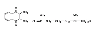 Ett K-vitamin. Gjord av Chrizz